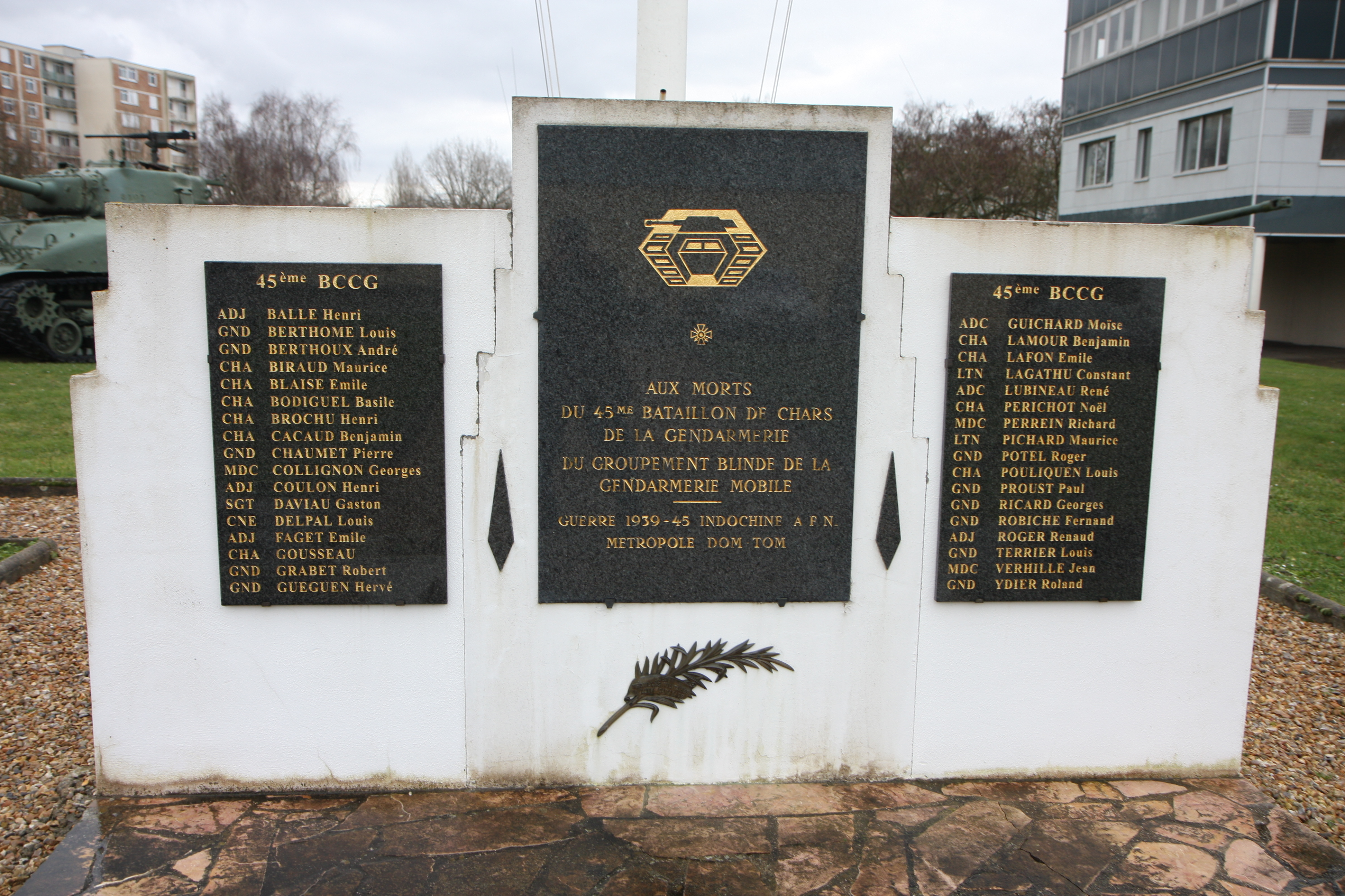 Plaque commémorative du 45e BCC - GBGM - Satory (78)